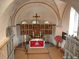 Der Altar der St. Johannes Kirche zu Wiefelstede